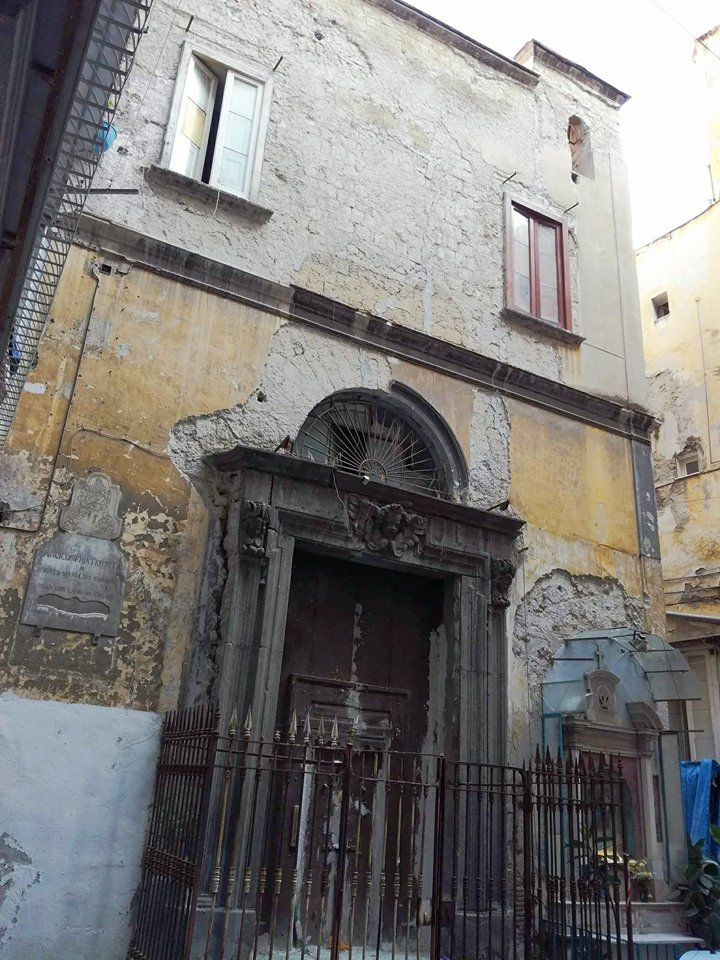 Esterno Girolamo dei Ciechi